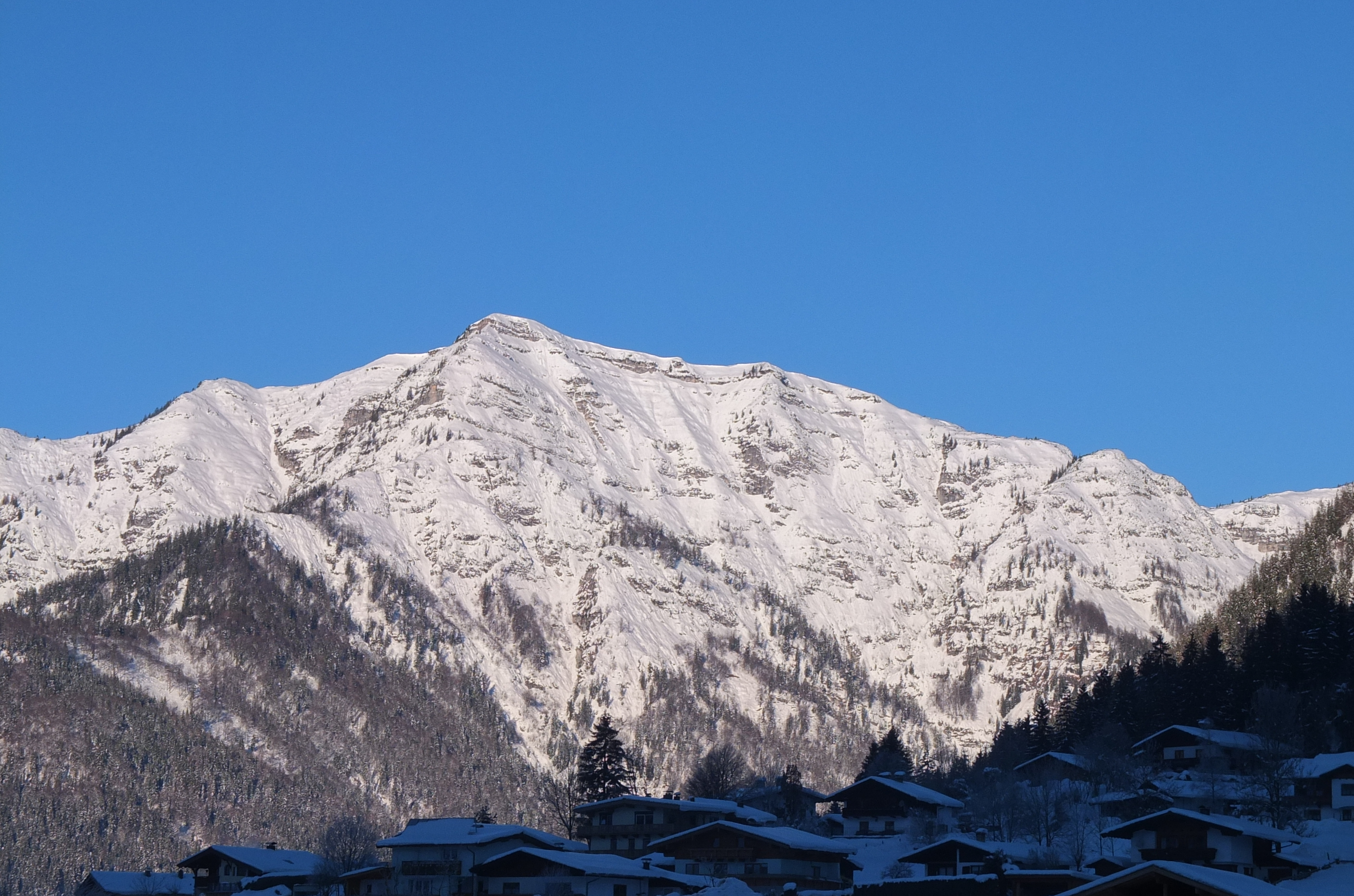 Das Fellhorn in den Chiemgauer Alpen